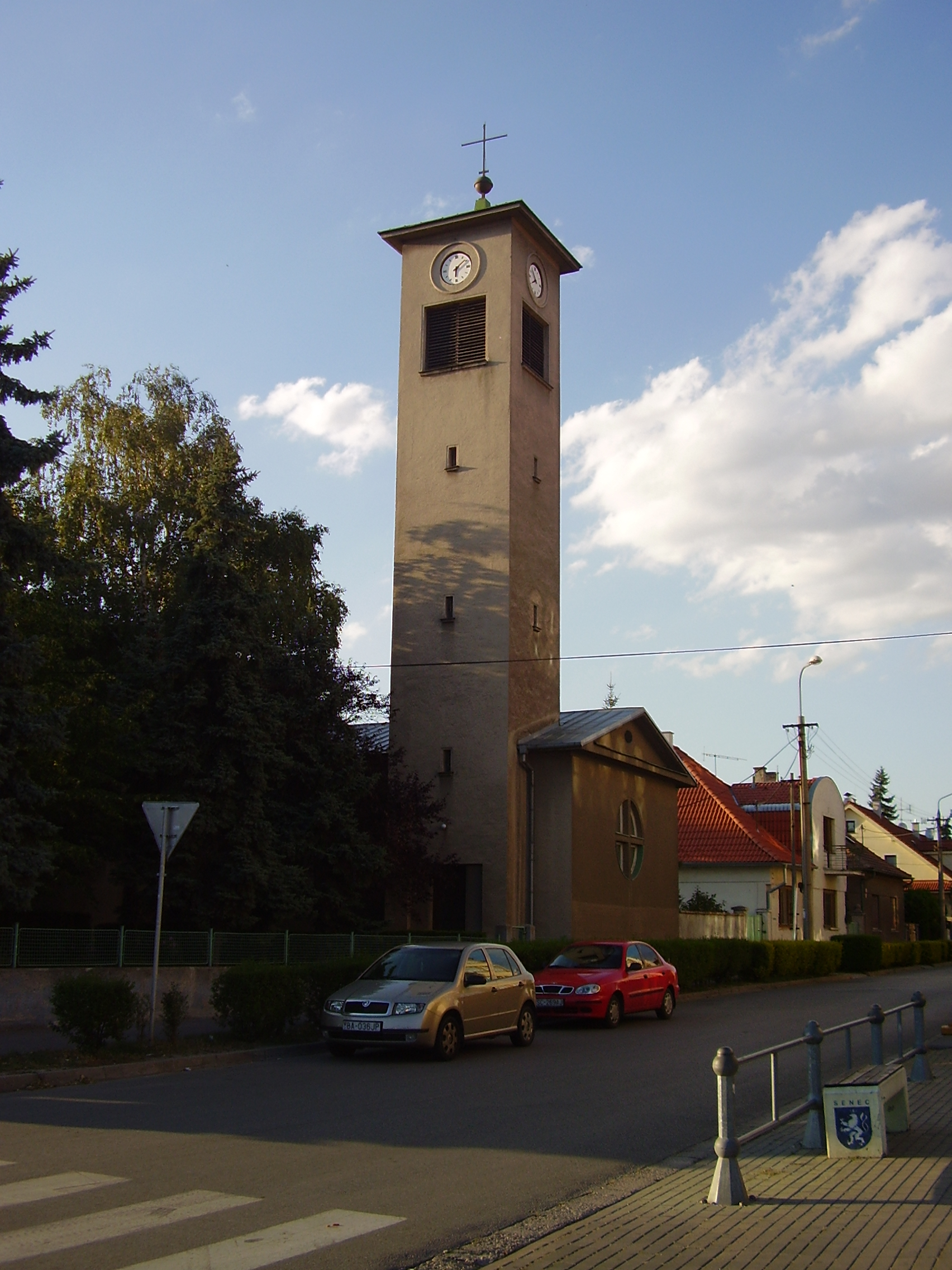 Senec